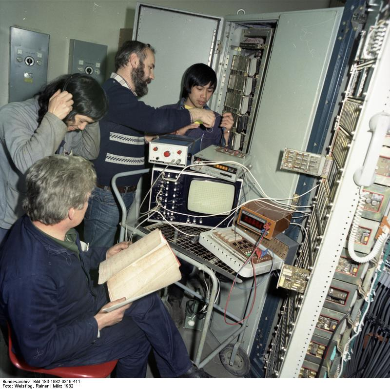 ADN-ZB/Weisflog/19.3.82/Bez.Cottbus: In einem Neuererkollektiv des Tagebaus Greifhain, das ein elektronisches Prüfgerät zur Überprüfung der Bandanlagensteuerung gebaut hat, qualifiziert sich Hoa Huy Nguyen aus der VR Vietnam (r.). Im Kraftwerk Thierhach hat er den beruf des BMSR-Mechanikers erlernt. Unter der Obhut von Ing. Günter Bosseckert (2.v.r.) qualifizieren sich neben Hoa Huy Nguyen noch weitere Vietnamesen.